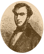 Gabriel Ferry, dobový portrét osoby, která zemřela v roce 1852 - z hlediska práv musí být naprosto volný